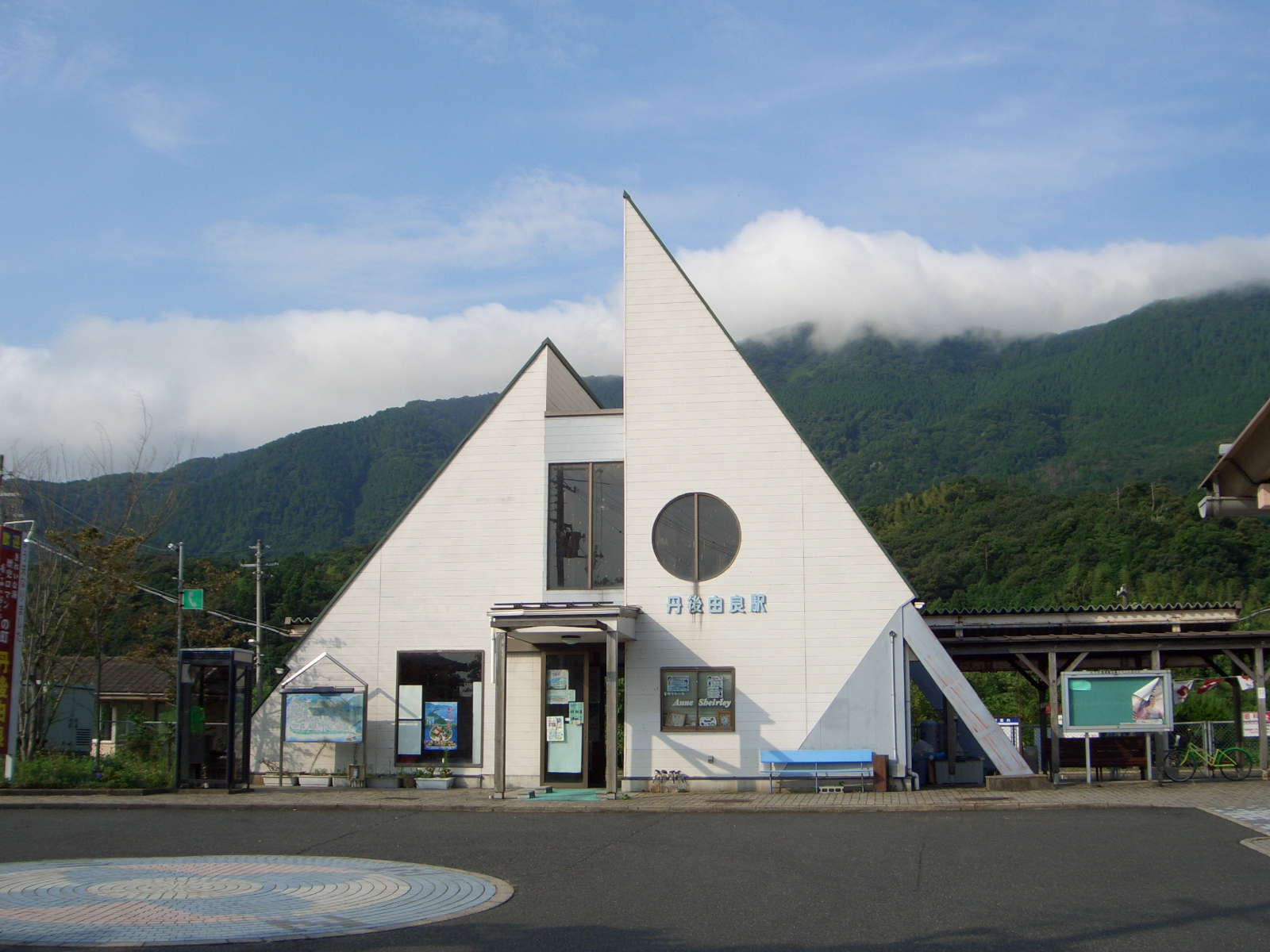 北近畿タンゴ鉄道宮津線丹後由良駅